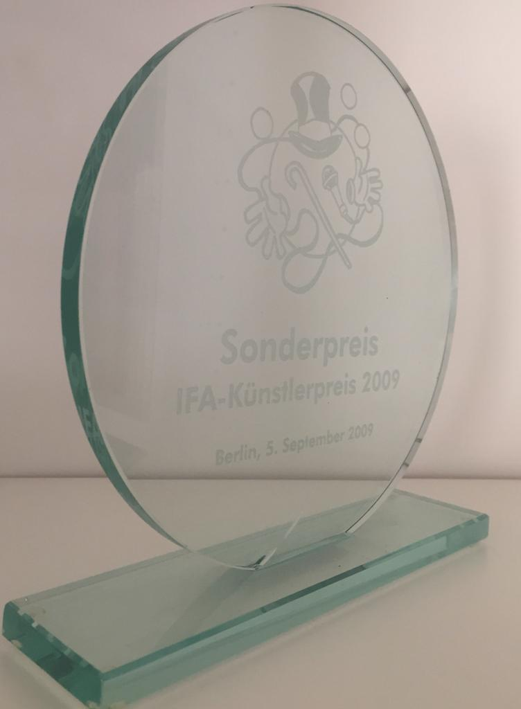 IFA-Künstlerpreis_Trophäe